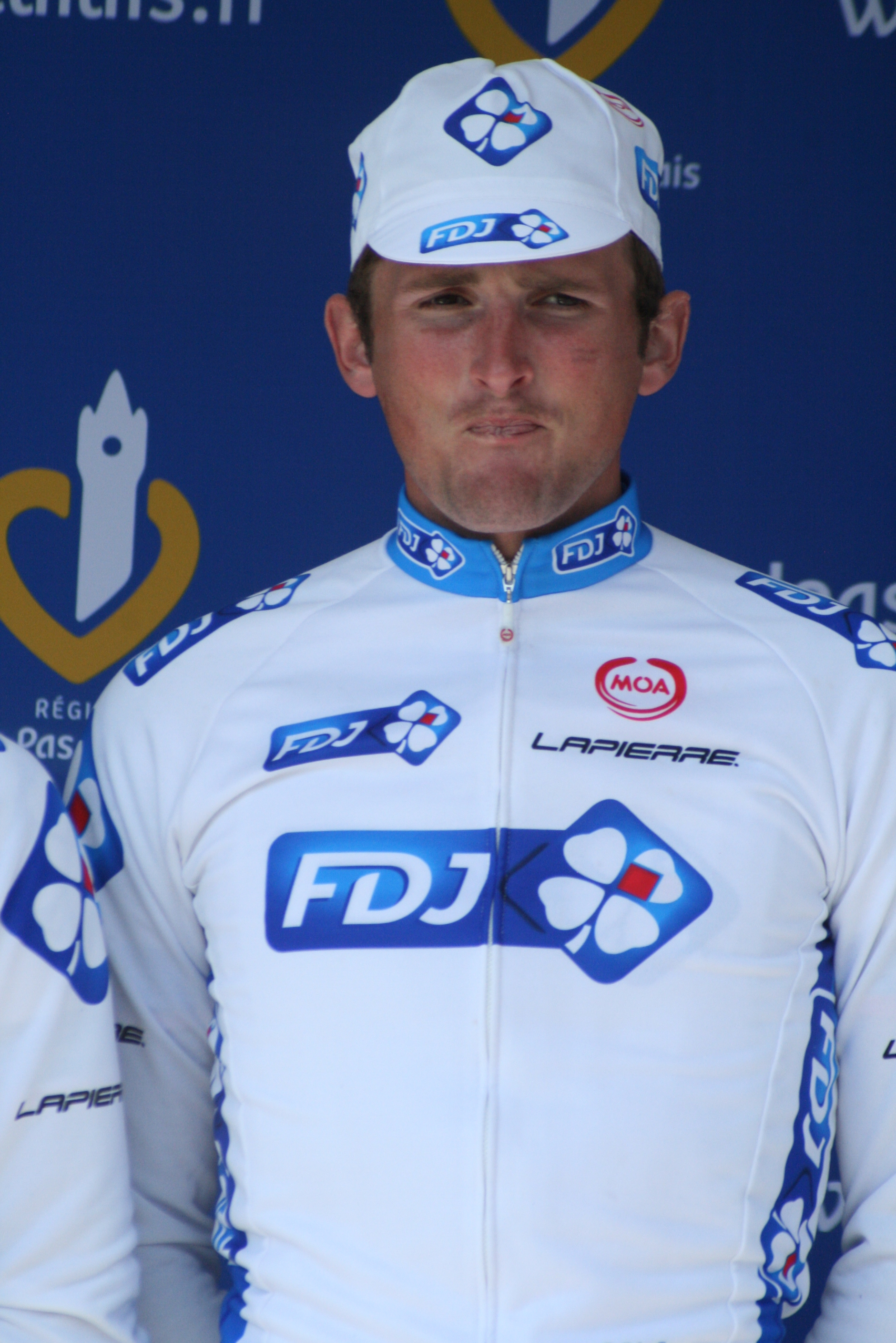 Présentation des coureurs au départ de la première étape Mickaël Delage